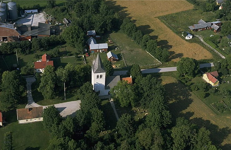 Buttle kyrka Motiv: Buttle Nyckelord: Flygbilder, Riksintressen Kategori: Kyrkomiljö Buttle kyrka.